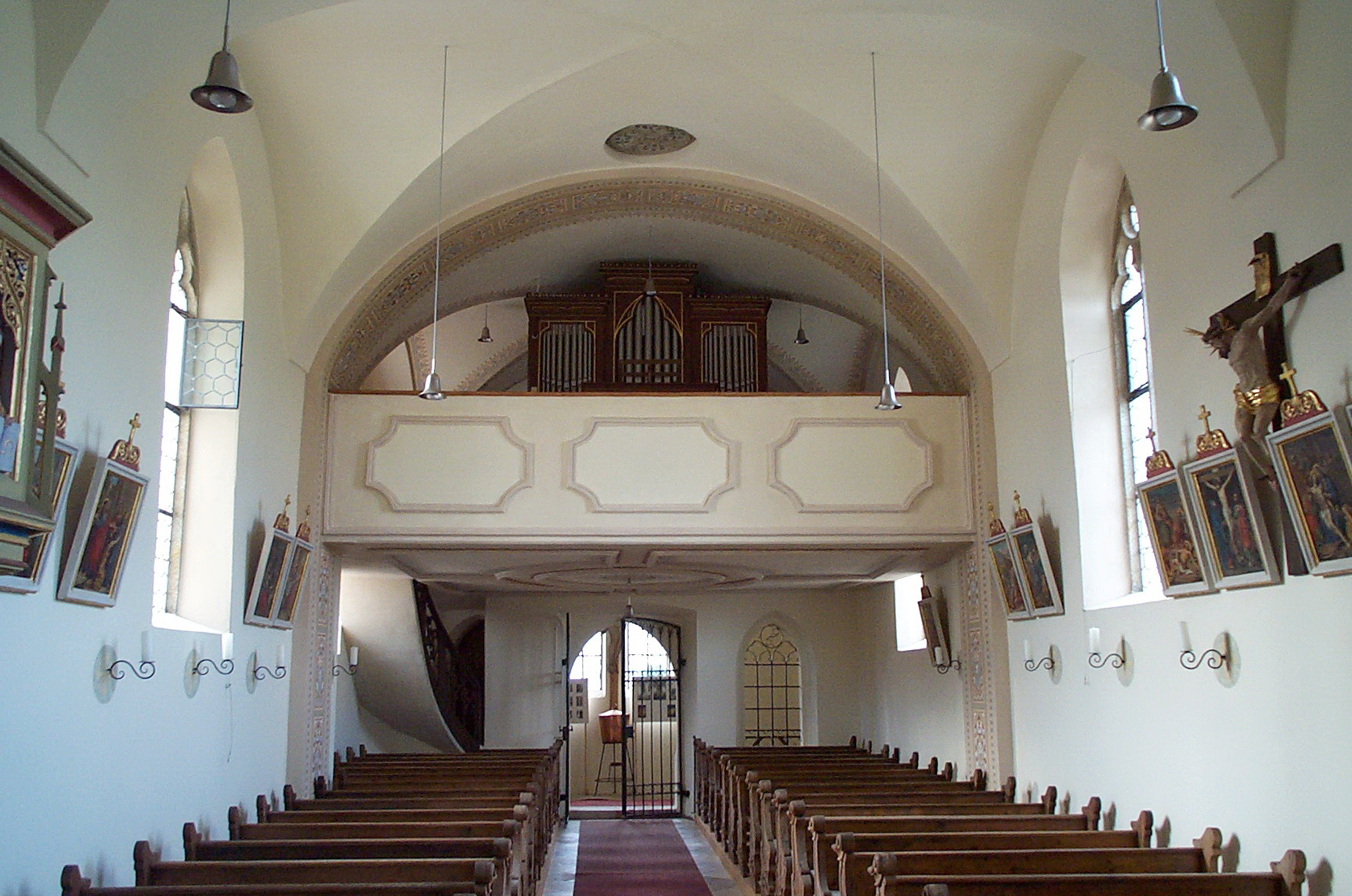 Oberneuhausen, Am Kirchberg 5. Filialkirche St. Peter und Paul. Saalkirche, Langhaus romanisch, Chor spätgotisch aus der zweiten Hälfte des 15. Jahrhunderts. Langhaus mit barocker Flachtonne und großen Stichen. Gerade Westempore mit Orgel.